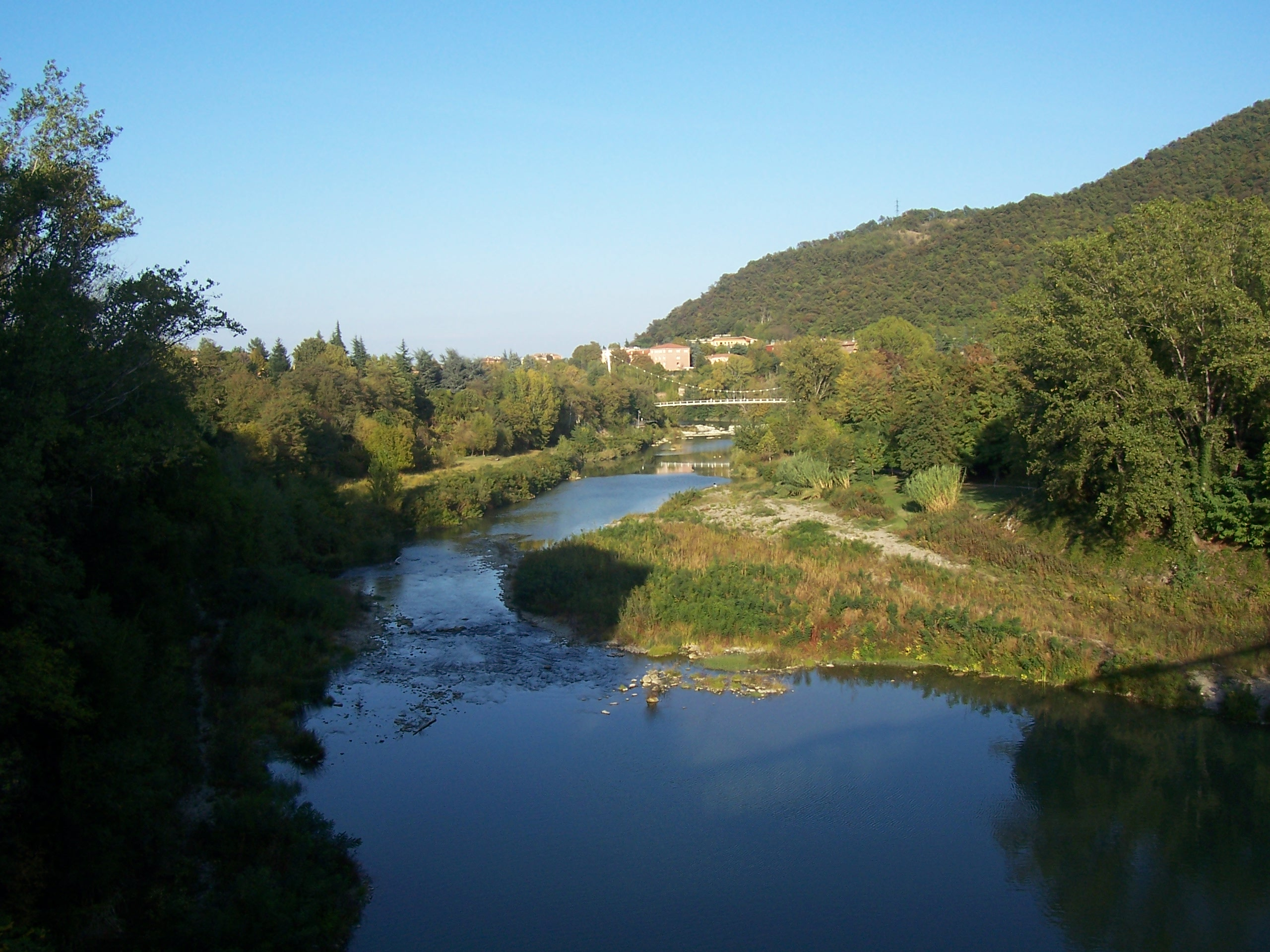 Reno a Casalecchio di Reno (BO) - Reno in Casalecchio di Reno (BO) - Reno River in Casalecchio di Reno (BO) - Reno à Casalecchio di Reno (BO)